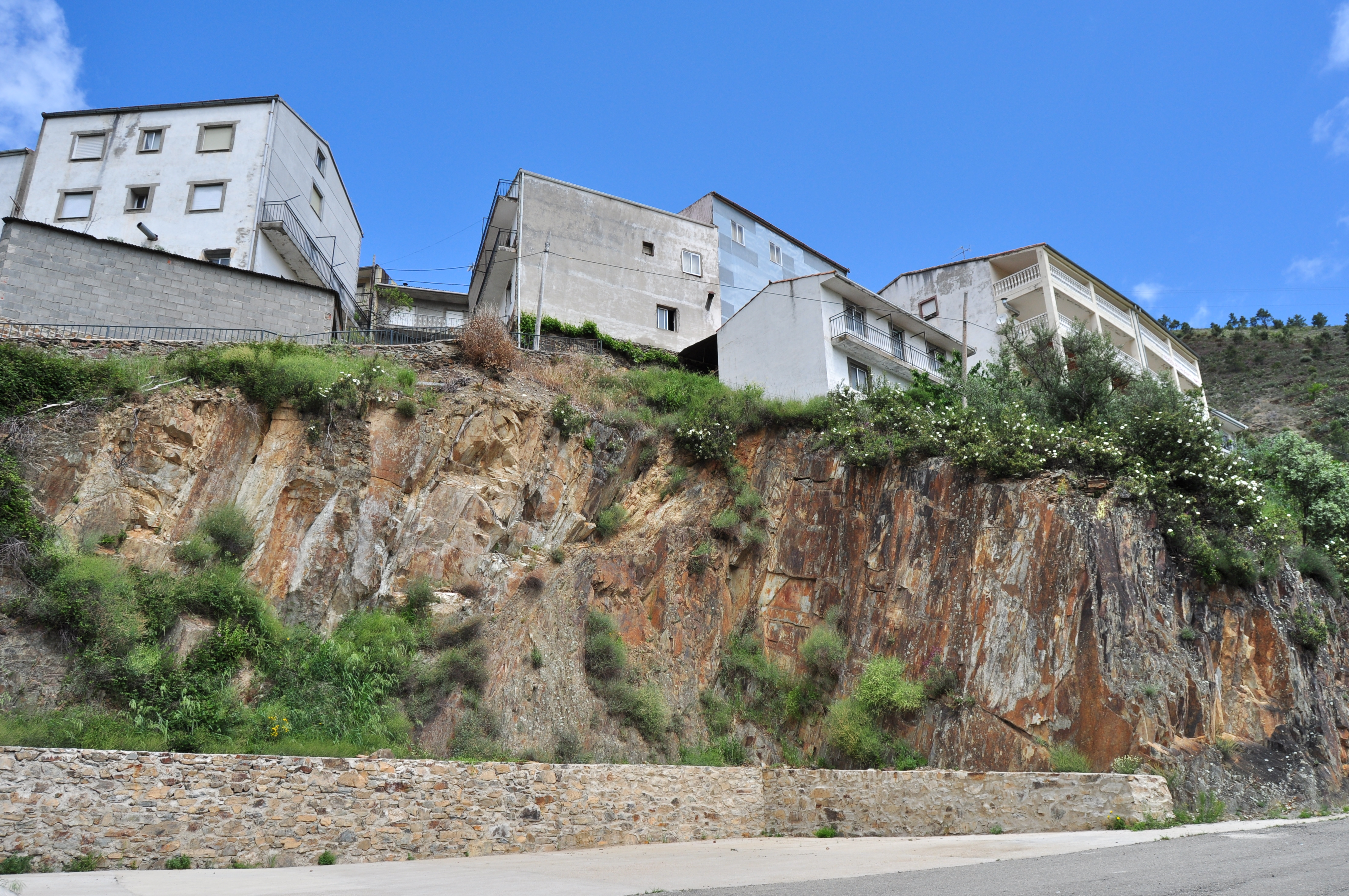 Huetre (Casares de las Hurdes) - 006